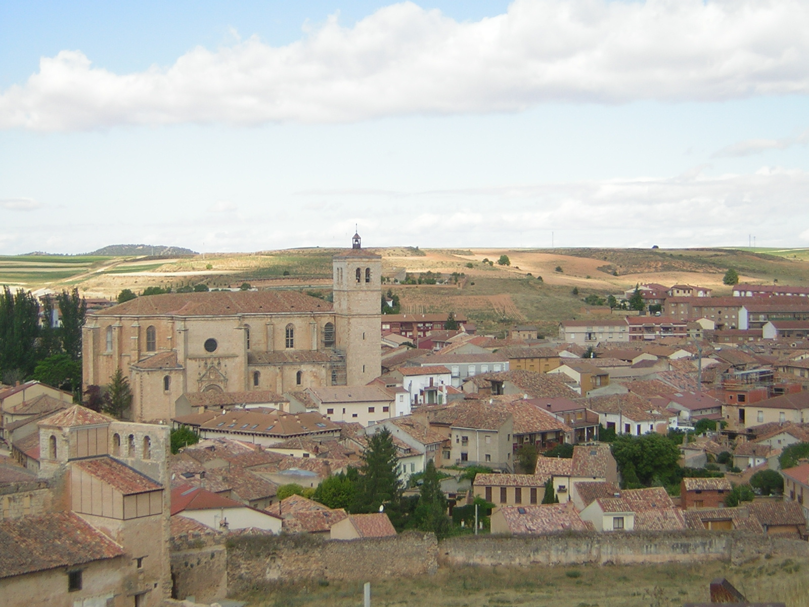 Berlanga de Duero vista desde su castillo.